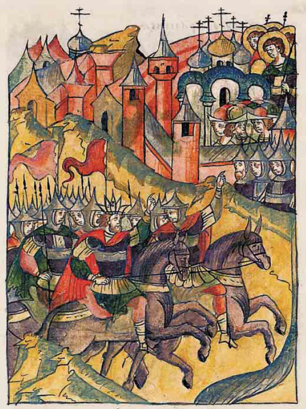 Лицевой летописный свод. 1521 год. Нашествие крымского хана Мехмед Гирея.